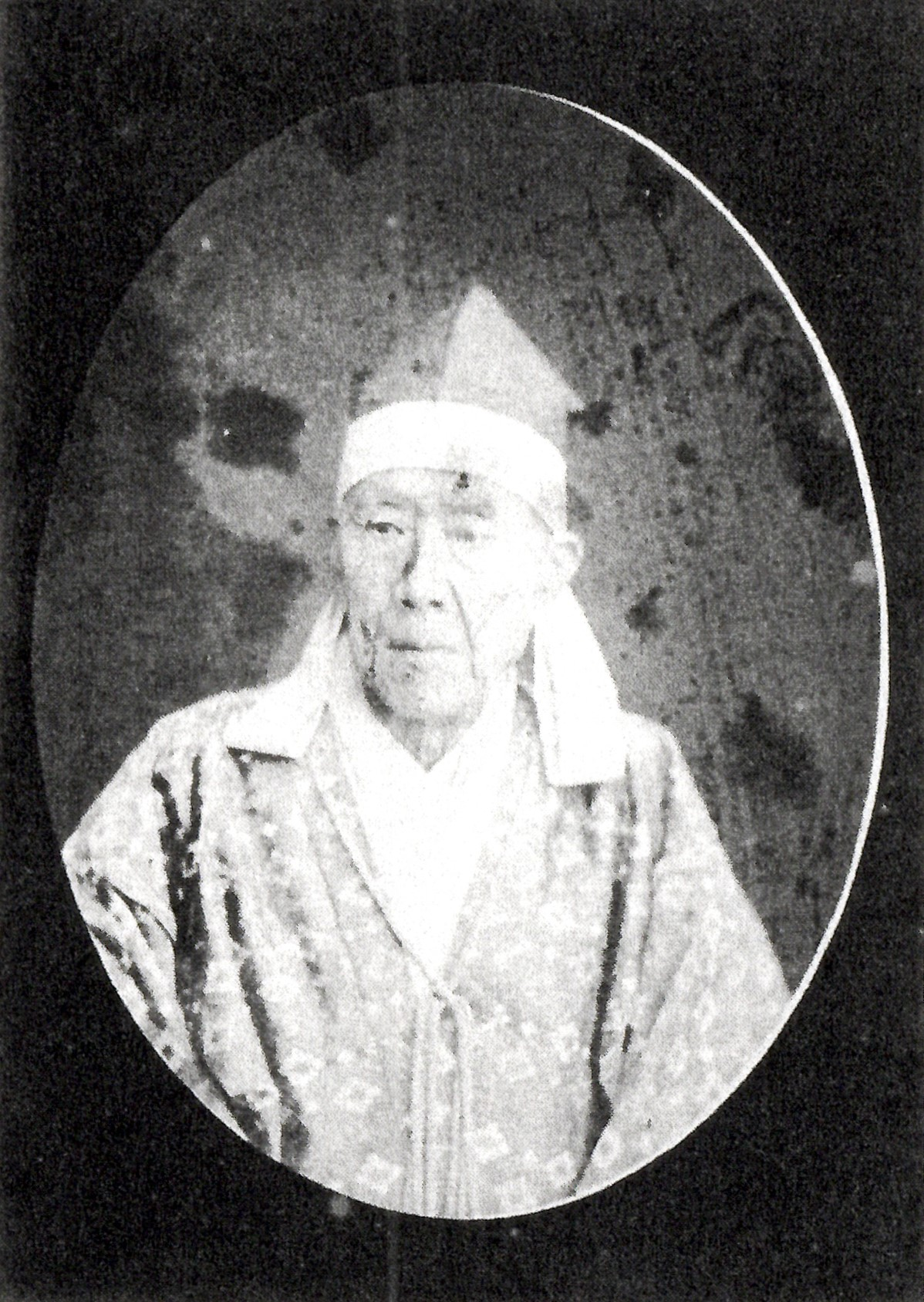 木下俊敦の肖像写真。